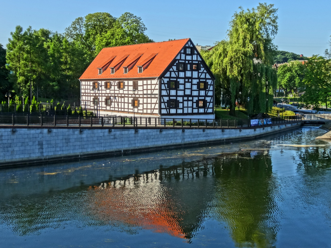 Biały Spichlerz na Wyspie Młyńskiej w Bydgoszczy, zbud. ok. 1790 r. na gotyckich piwnicach z XV-XVI w.